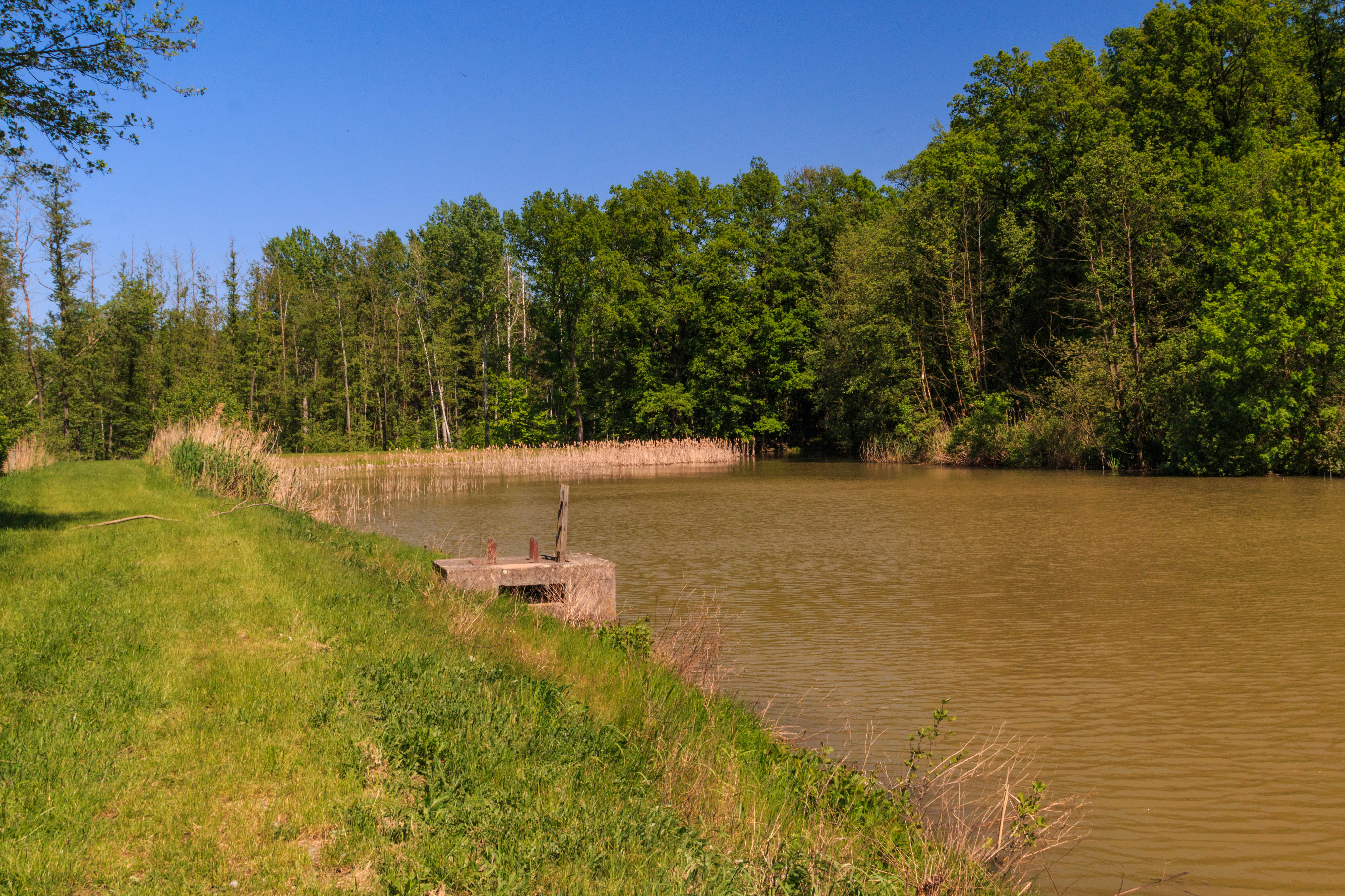 Rybník Lomenice u Těchlovic Project: Vodstvo.